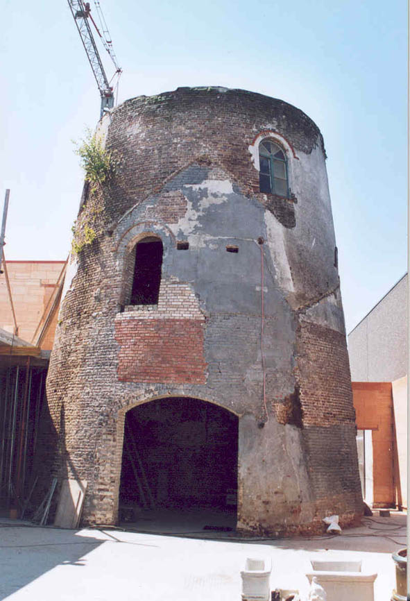 Beernem Bruggestraat 75 Plaetsmolen